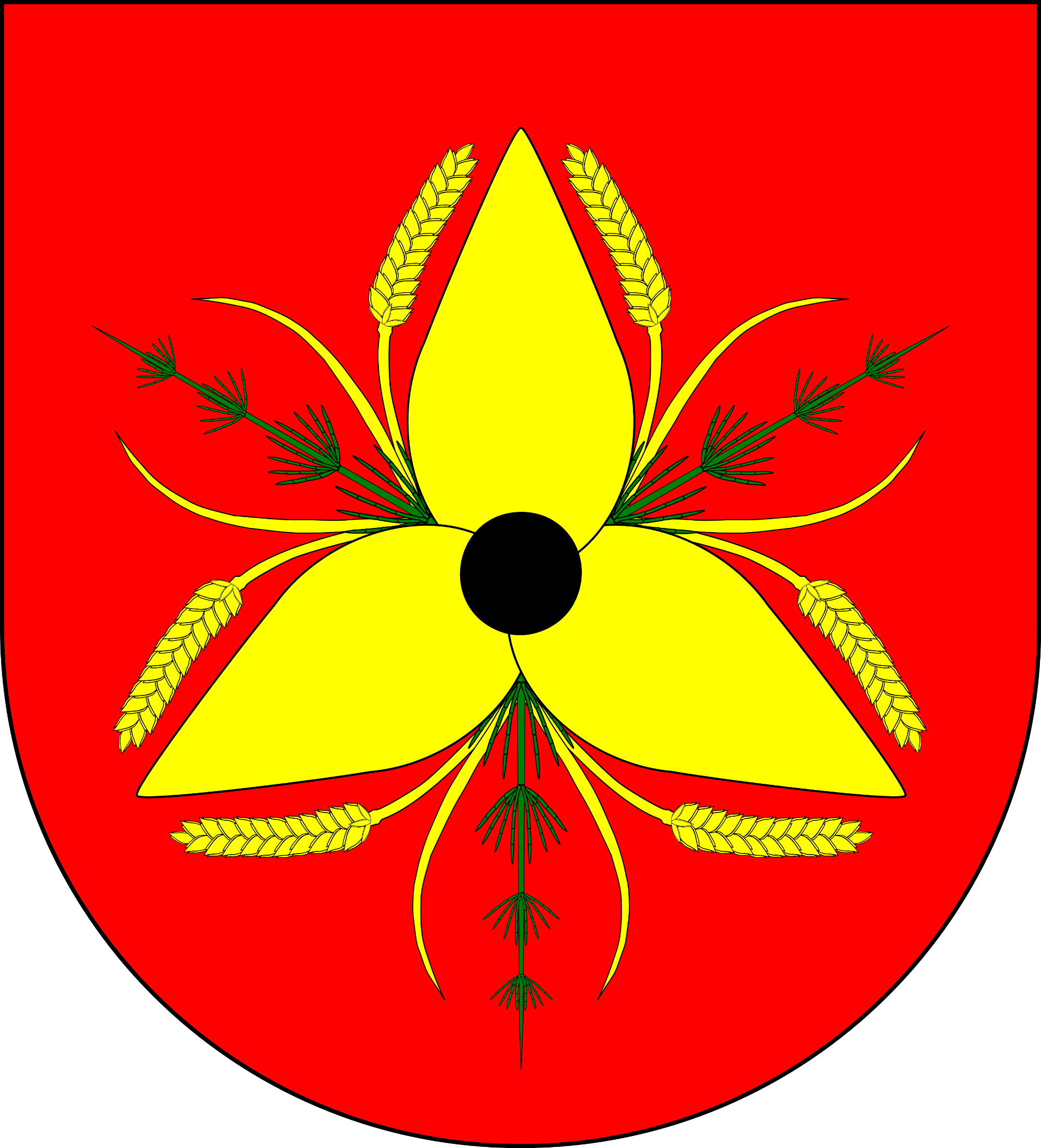 Herb Sołectwa Skrzypiec, miejscowości w województwie opolskim, powiecie prudnickim, Gminie Lubrza